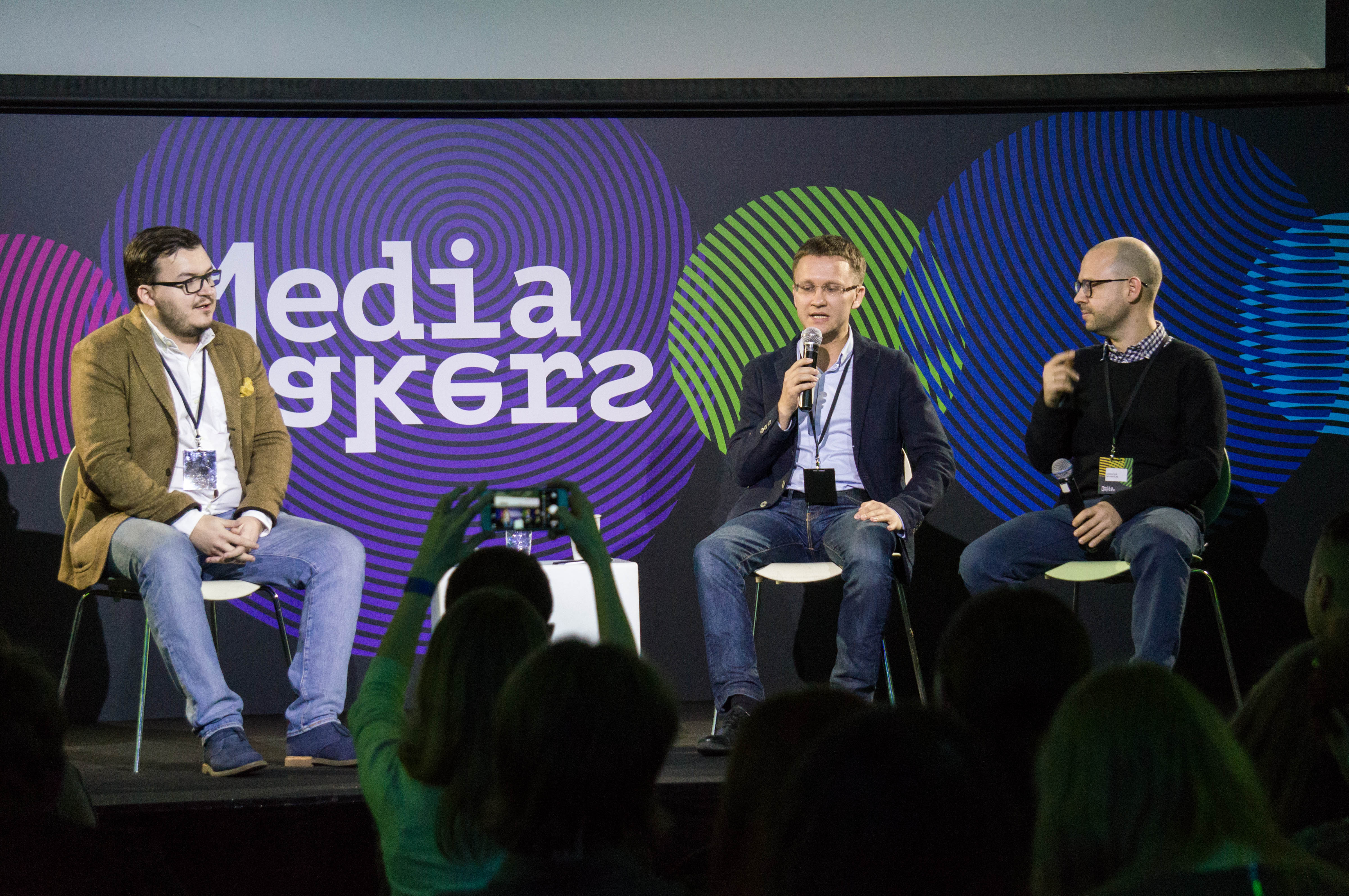 Ивар Максутов, Илья Курмышев и Алексей Мунипов на конференции MedaiMakers 2015